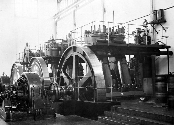 Repronegatief. Interieur van de electrische centrale met 2 dieselmotoren in bedrijf